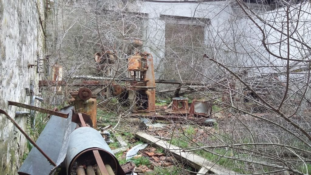 Zona donde se realizaban los diferentes trabajos